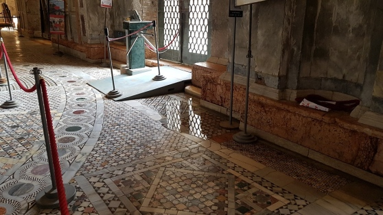 Bildet viser vann-nivå i San Marco, legg merke til at det innvendige gulvet ligger lavere enn utvendig piazzanivå.